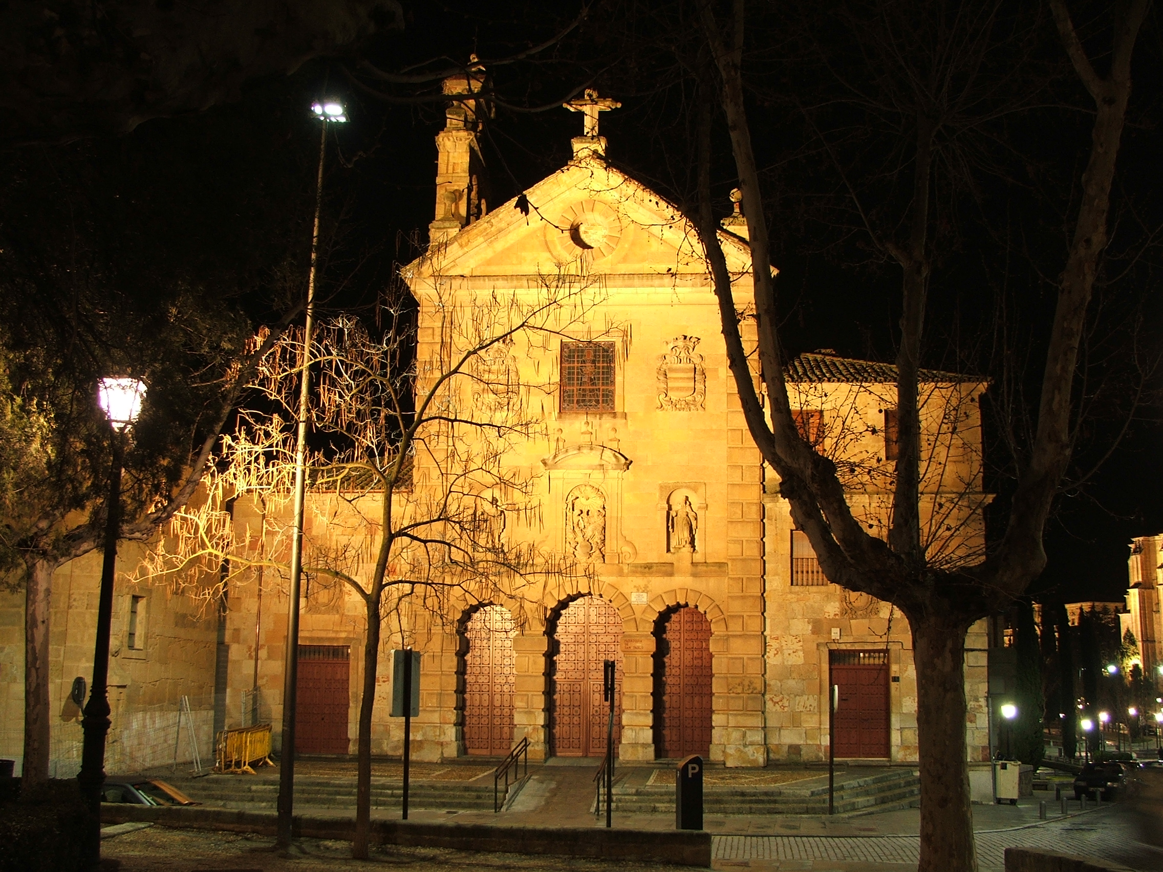 Fachada de la iglesia de San Pablo en Salamanca.